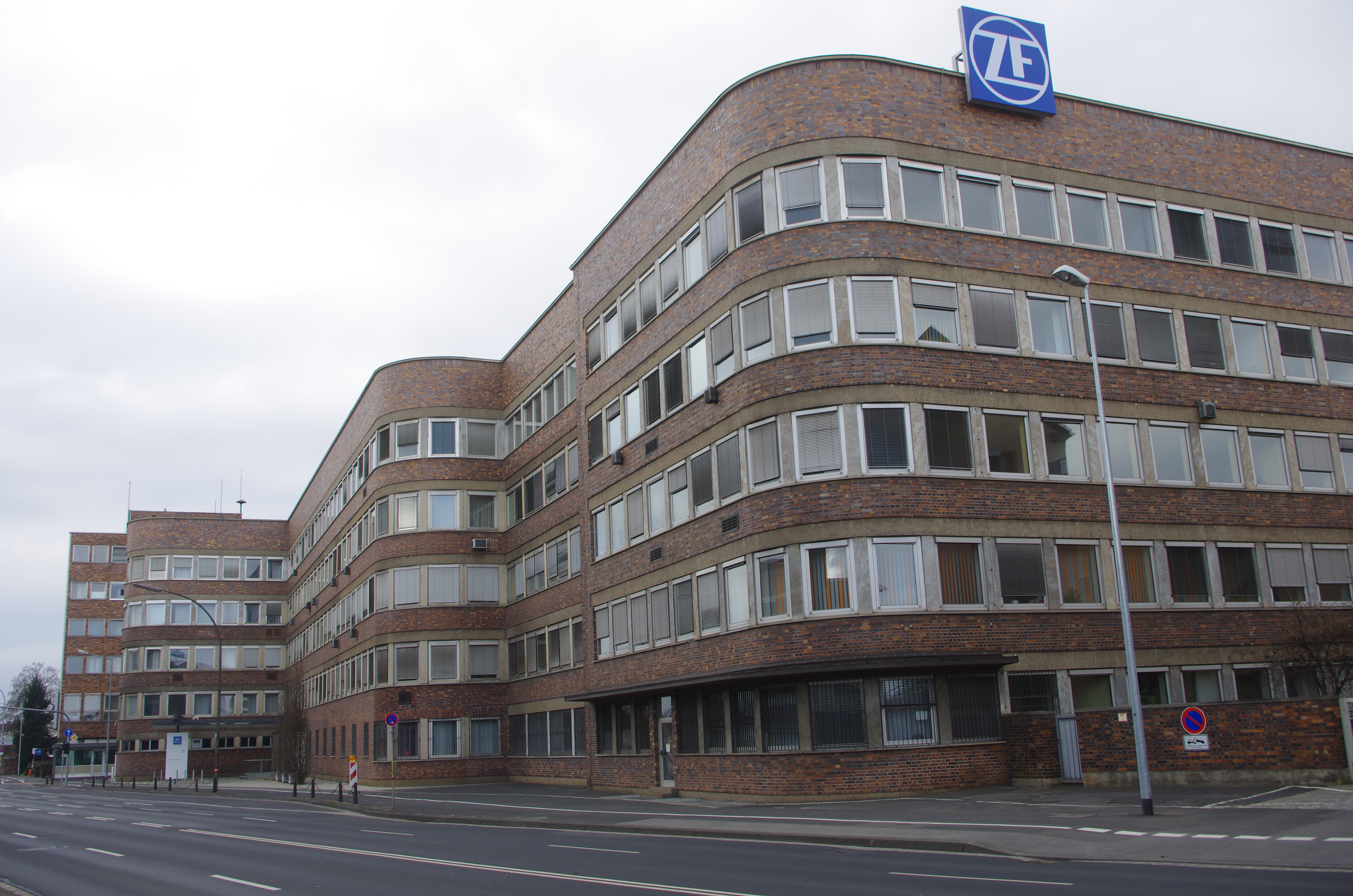 Verwaltungsbau der früheren Fichtel & Sachs, heute Standort Schweinfurt der ZF Friedrichshafen, ehemals dreigeschossiger Sichtziegelbau mit zweifach zurückspringender Fassade mit gerundeten Kanten, später auf 5 Stockwerke aufgestockt: Architekt: Paul Bonatz, Baujahr 1932 Schornstein, der verbreiterte Bereich in der Mitte ist ein Wasserbehälter, erricht aus Ziegeln, Beton und Stahl 1917. Heute als Antennenmast genutzt. 49″ N, 10° 12′ 44.48″ E